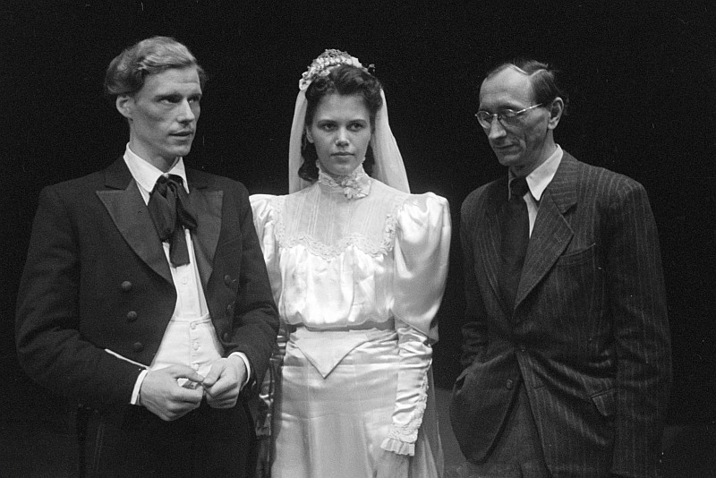 Original image description from the Deutsche Fotothek Szenenbilder